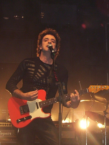 Gustavo Adrián Cerati ئۇيغۇرچە / Uyghurche: Gustavo Adrián Cerati